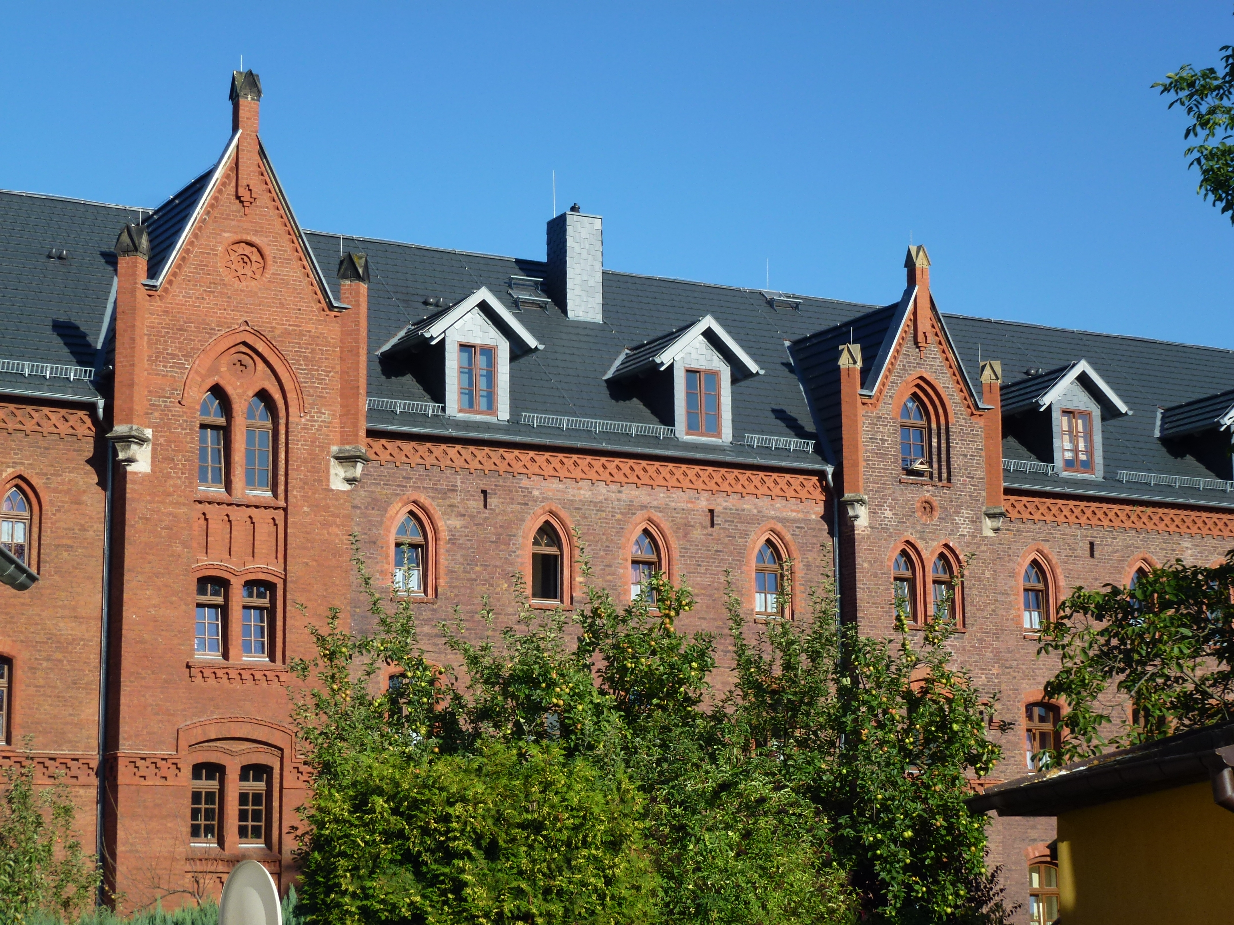 Rückansicht des Georgii-Hospitals in Wernigerode, Sicht von der Kantstraße.